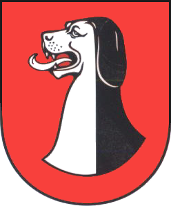 Wappen der Stadt Bad Lobenstein